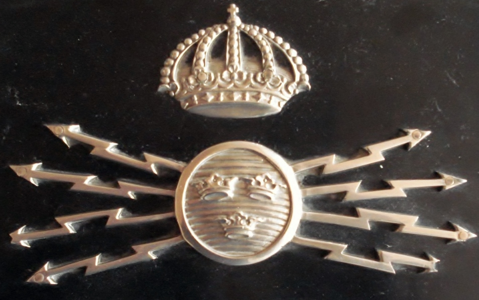 Emblem Fälttelegrafkåren. Sidoemblem från 1920-talet som har suttit på kårchefens bil.